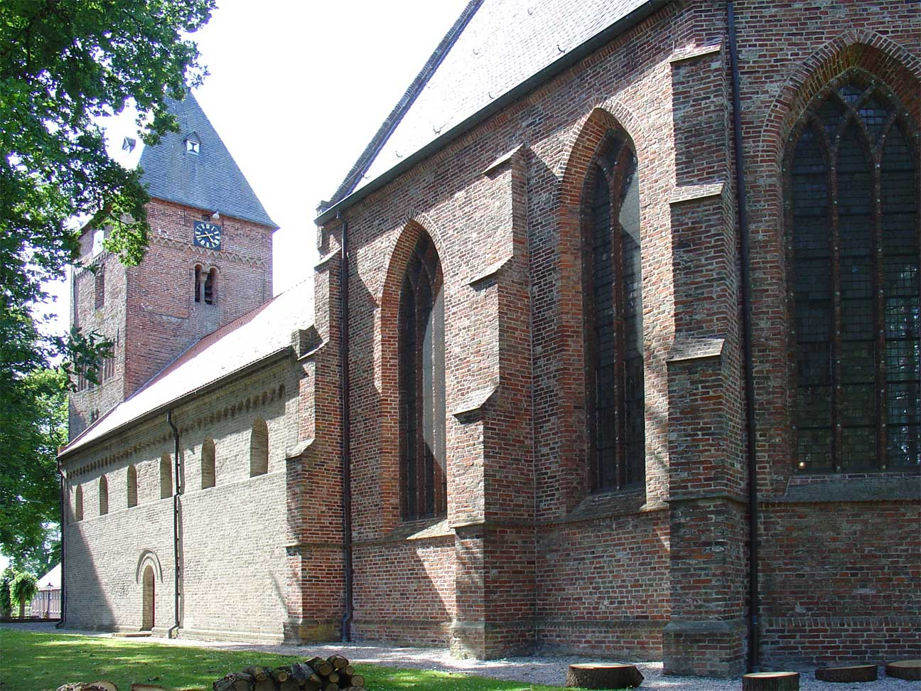 Sint Bonifatiuskerk van Vries